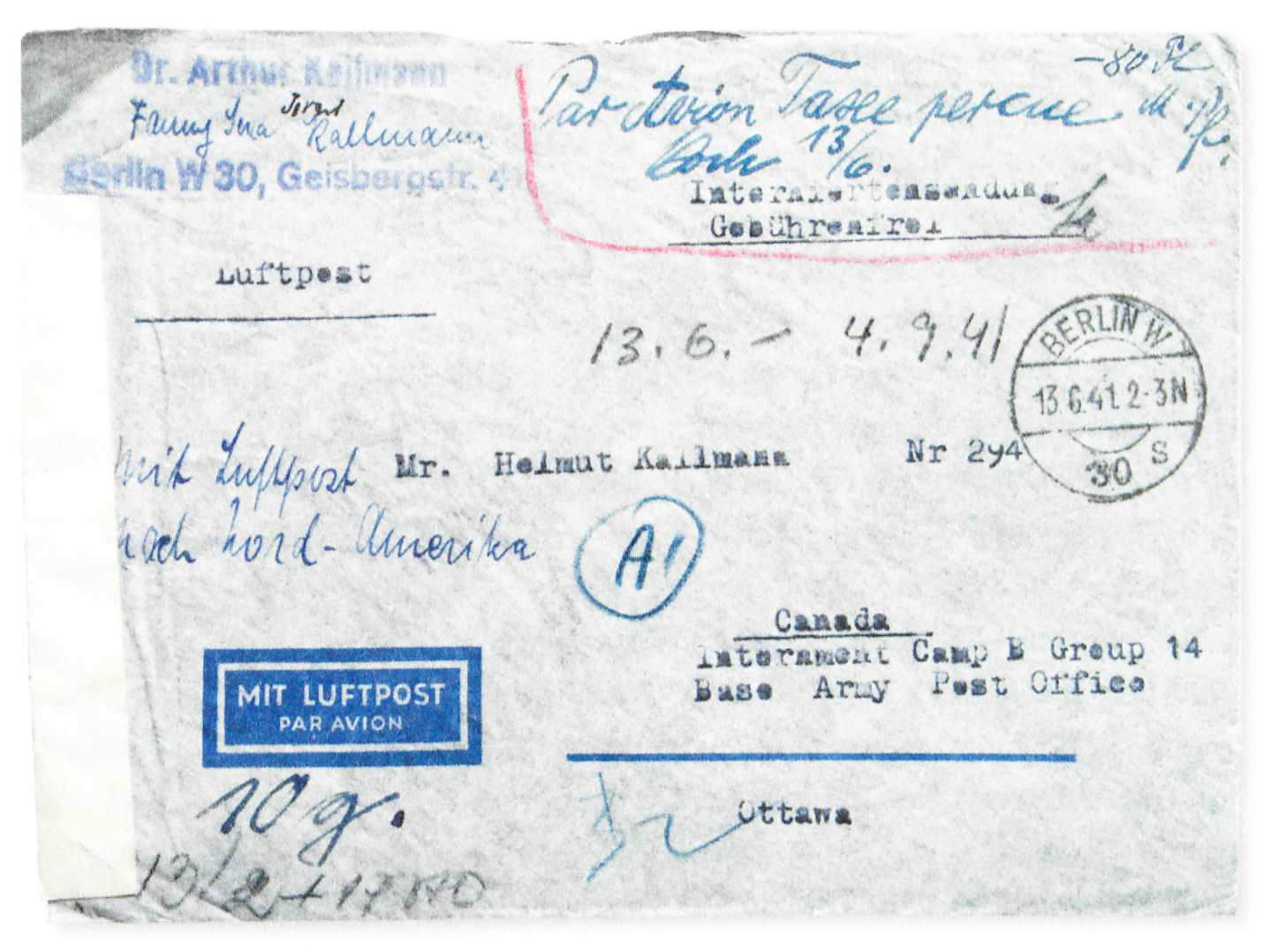 Letter from Arthur Kallmann Berlin to Helmut Kallmann Canada 1941